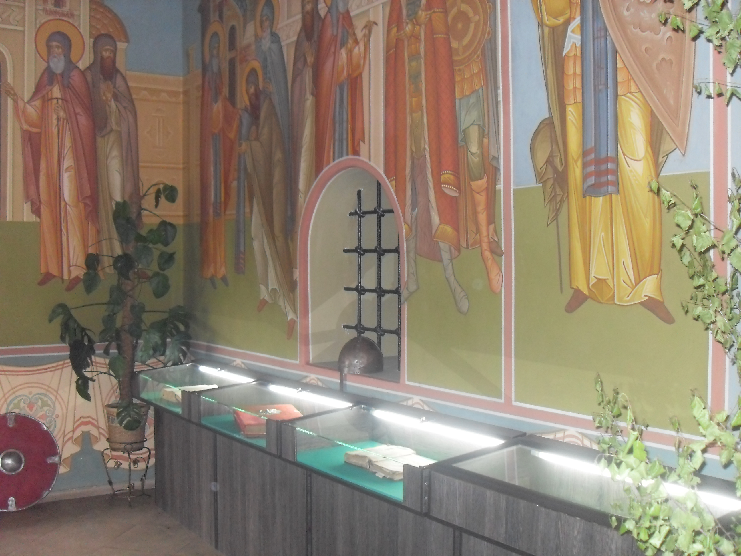 Куликово поле: Богородицкий район, Тульская область This image is related to the protected area of Russia number 7100018